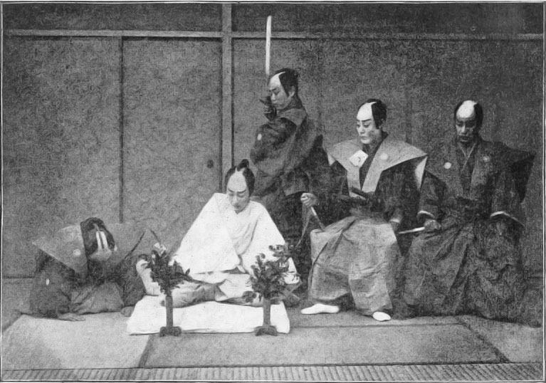 Versión de Image:Seppuku.jpg con pequeñas modificaciones de contraste, brillo, exposición y reducción de ruido.